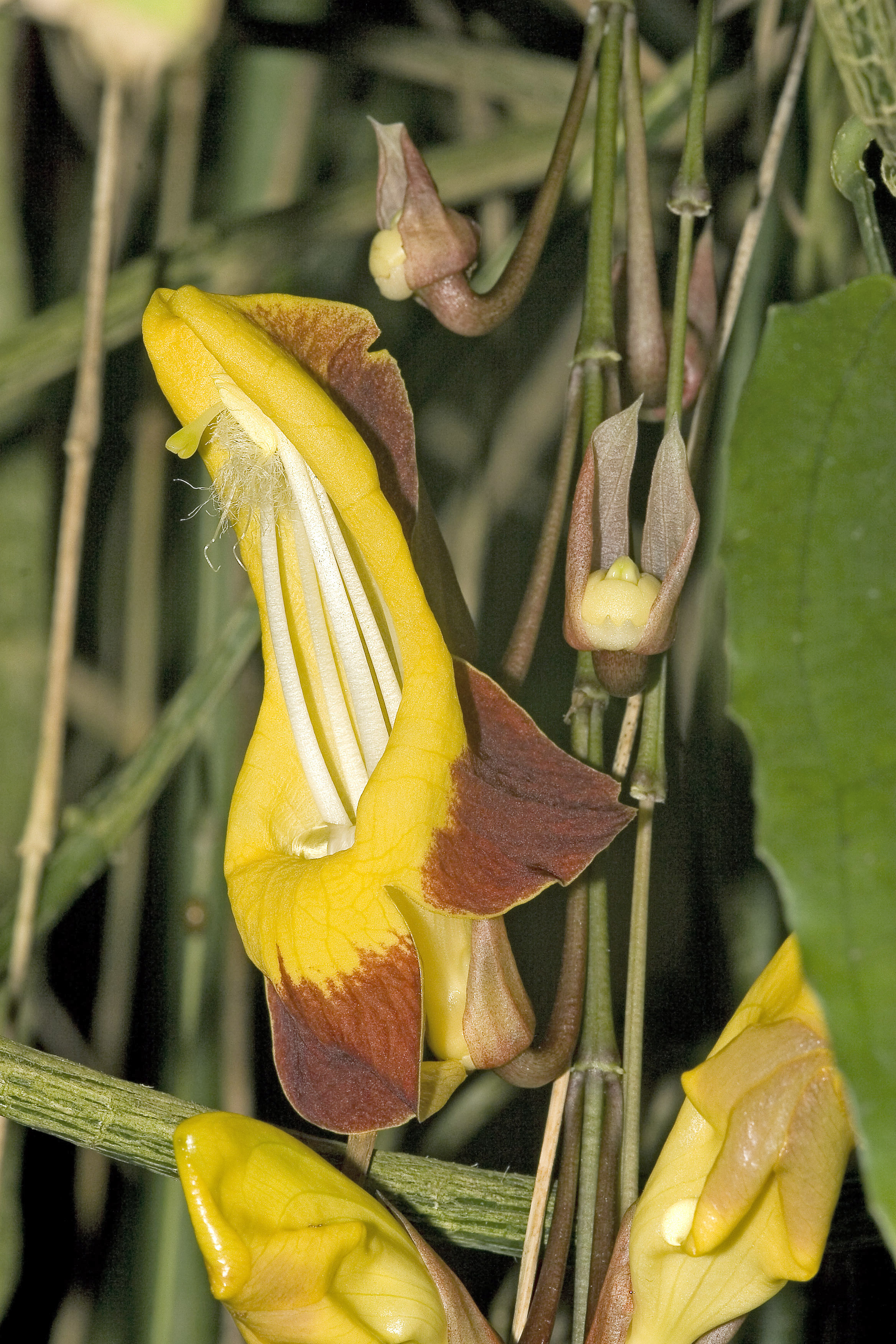 Thunbergia mysorensis